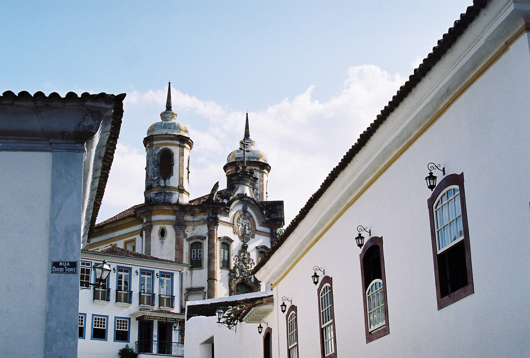 Ouro Preto, MG: conjunto arquitetônico e urbanístico